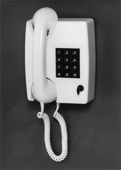 Telefon Österreich, Komfort-Wandapp mit 12 teiligem Tastenwahlblock